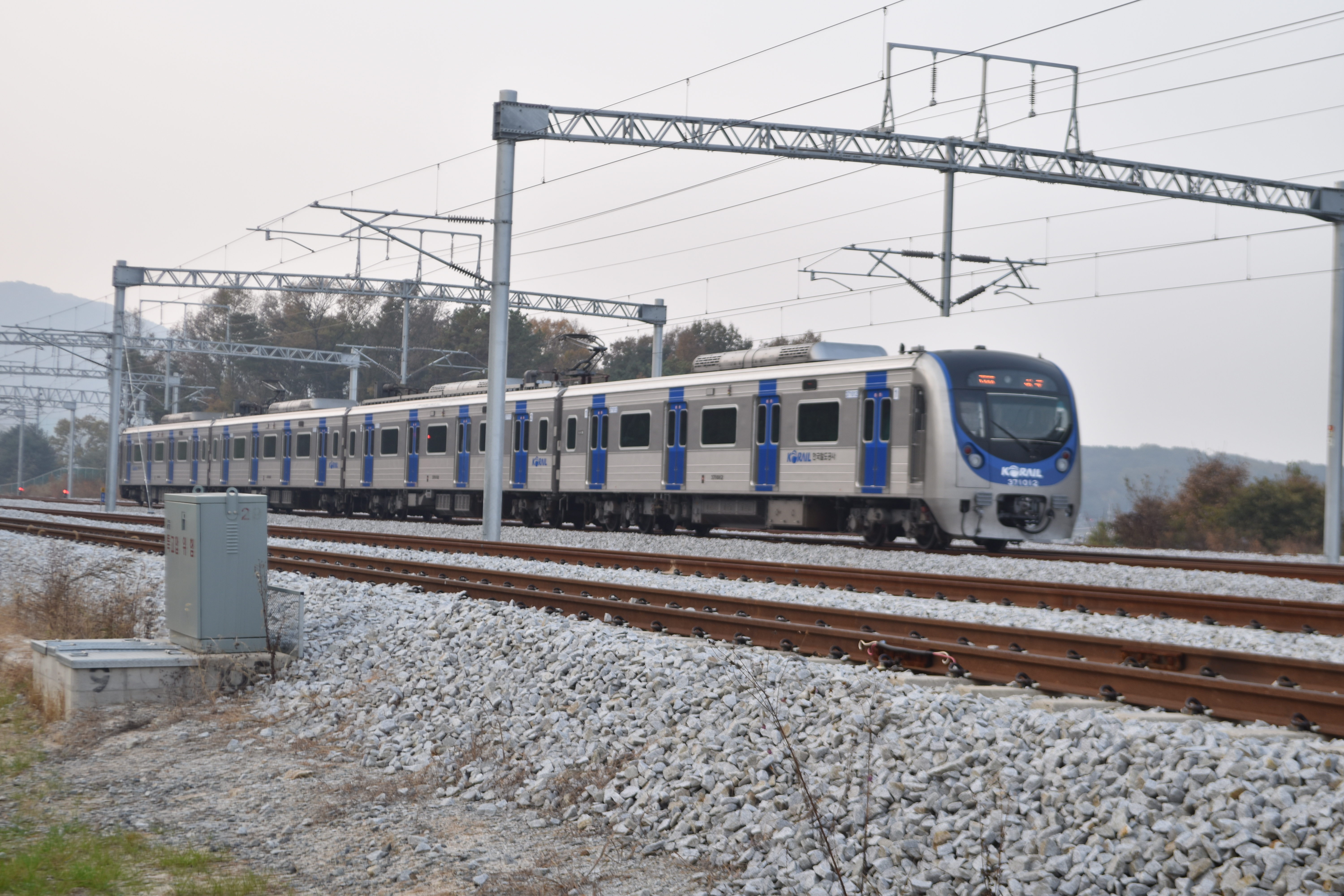 여주역으로 진입하는 37112편성